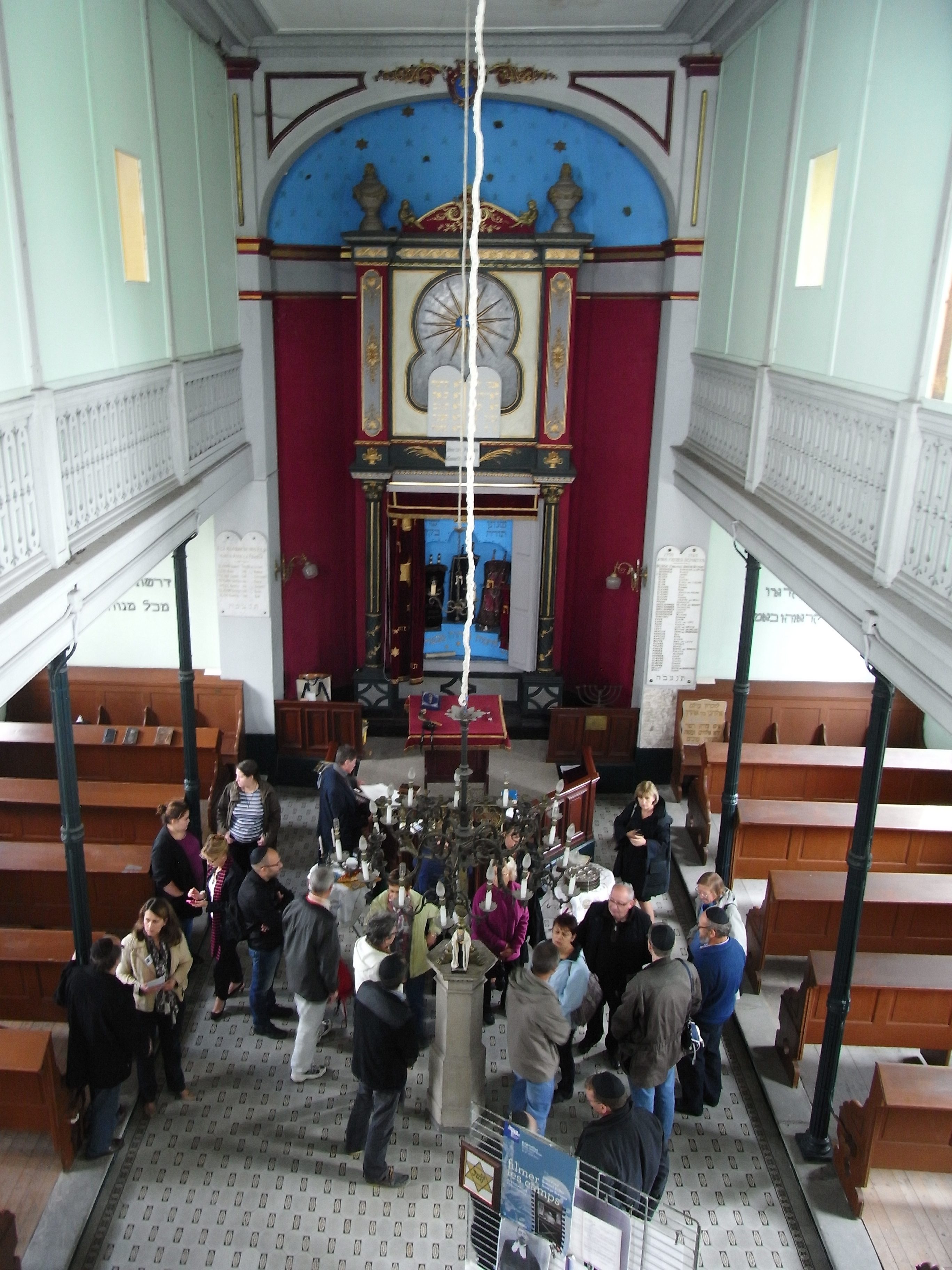 Intérieur de la synagogue de Montbéliard.